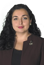 Kosovarische Politikerin